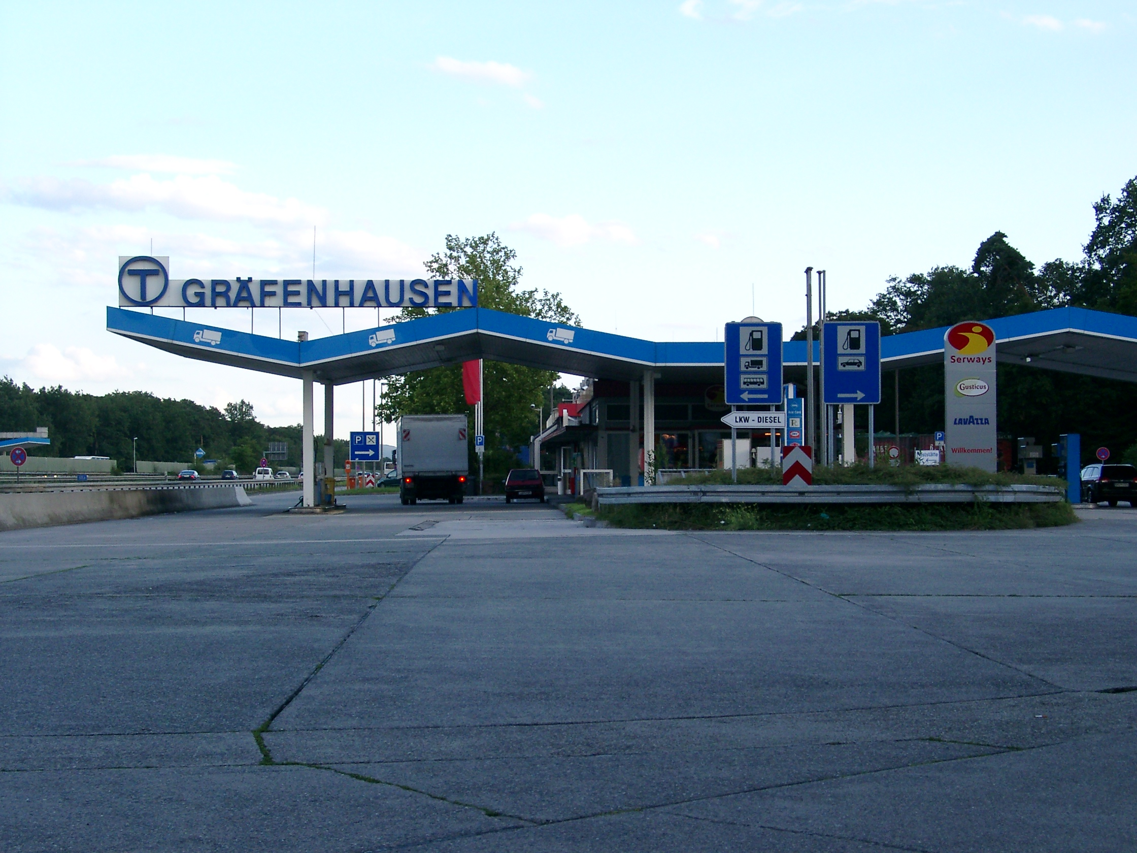 BAB Raststätte Gräfenhausen West an der Bundesautobahn A5 Fahrtrichtung Süd